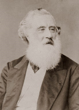 John Frederick Lewis